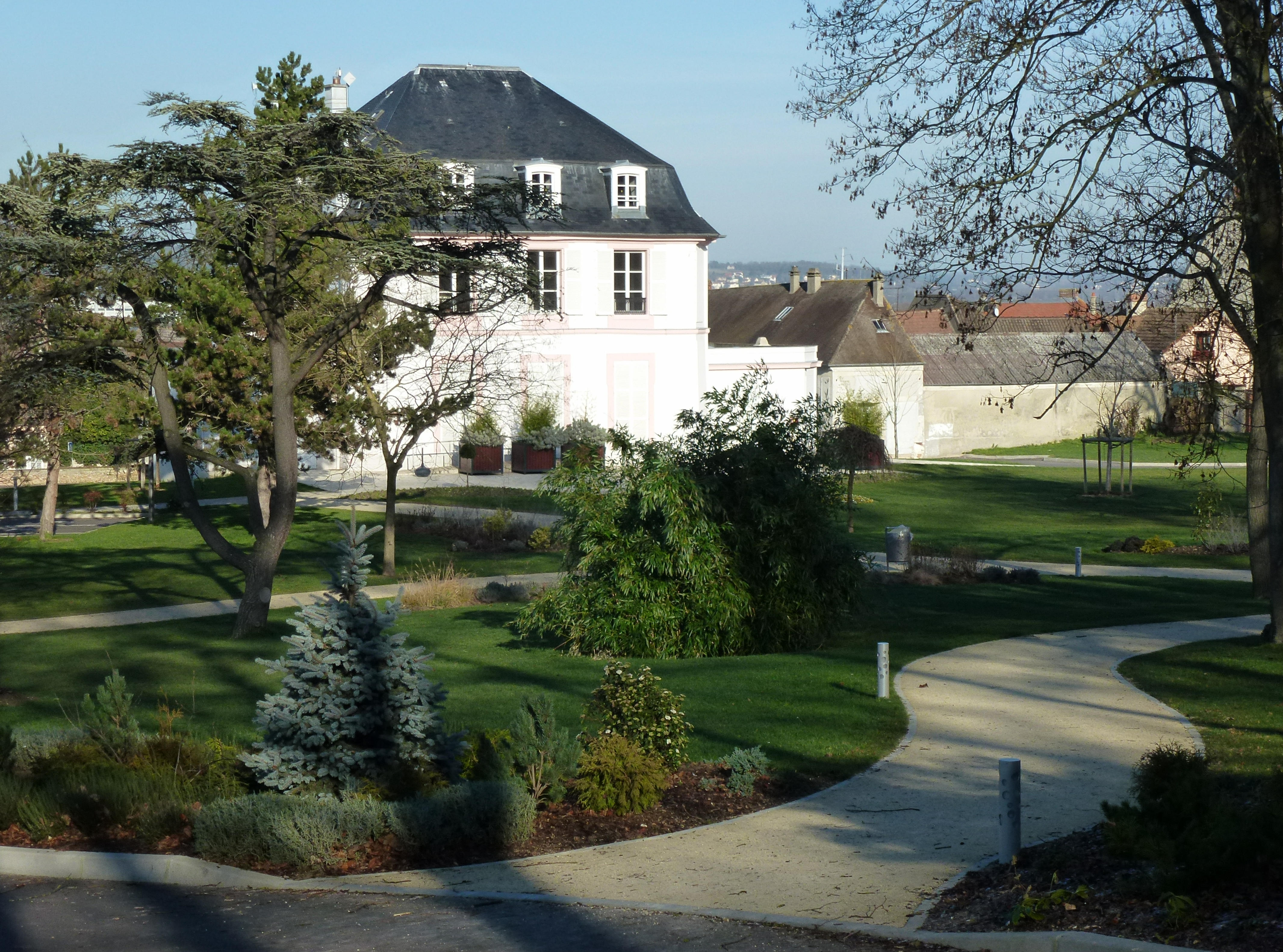 Château du Vivier à Aubergenville dans les Yvelines